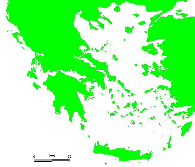 GR Gavdos.PNG (Greek island)